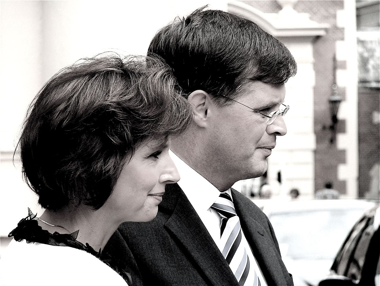 Haar bijnaam is "de stille doctor", vanwege haar academische titel en het feit dat ze nauwelijks in de publiciteit opereert.